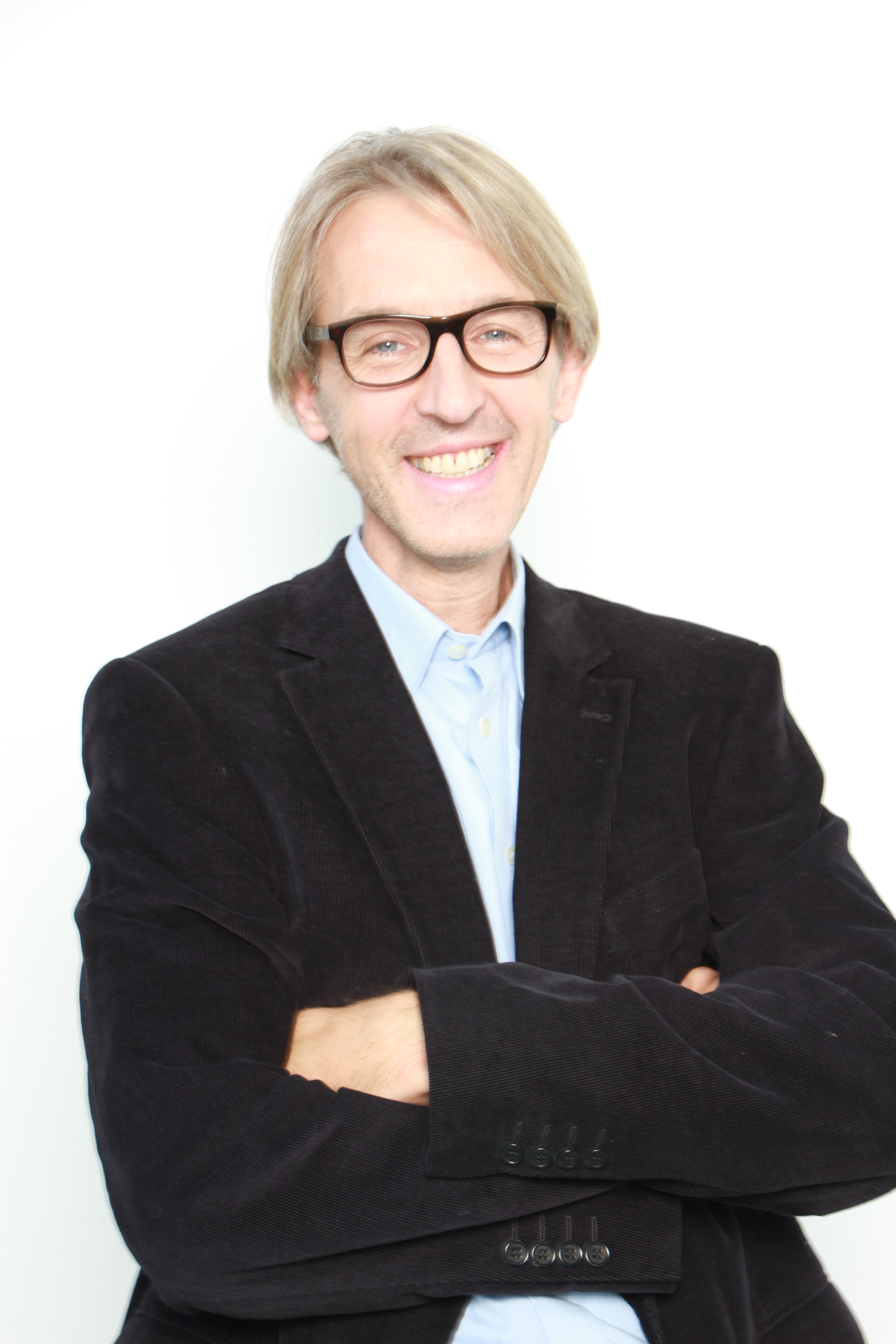 Andreas M. Schmidt (* 23. November 1963 in Heggen (Finnentrop)) ist ein deutscher Schauspieler, Regisseur und Rocksänger.